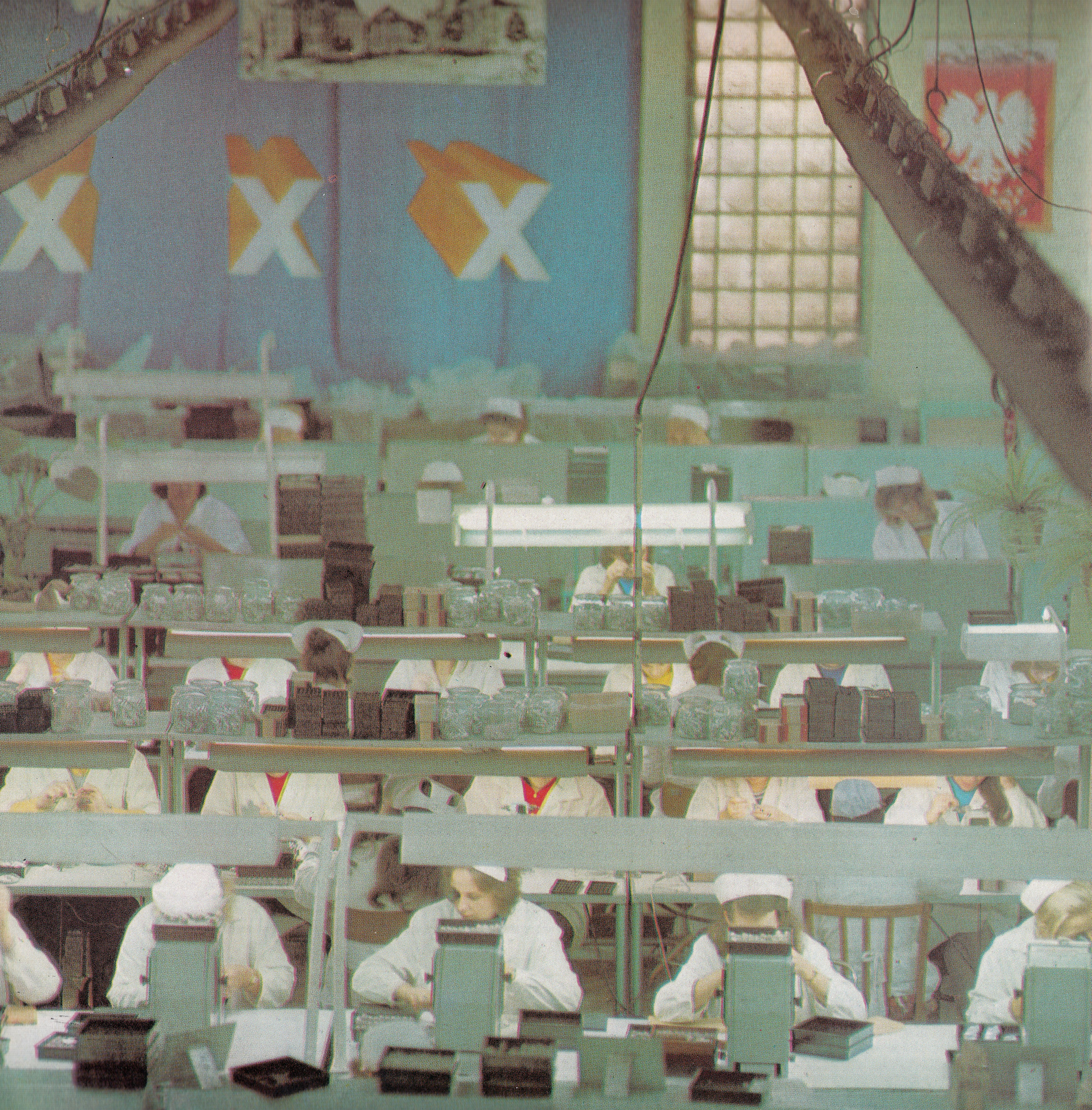 Zakłady Wytwórcze Lamp Elektrycznych im. Róży Luksemburg w Warszawie. Hala montażu odbiorczych lamp elektronowych